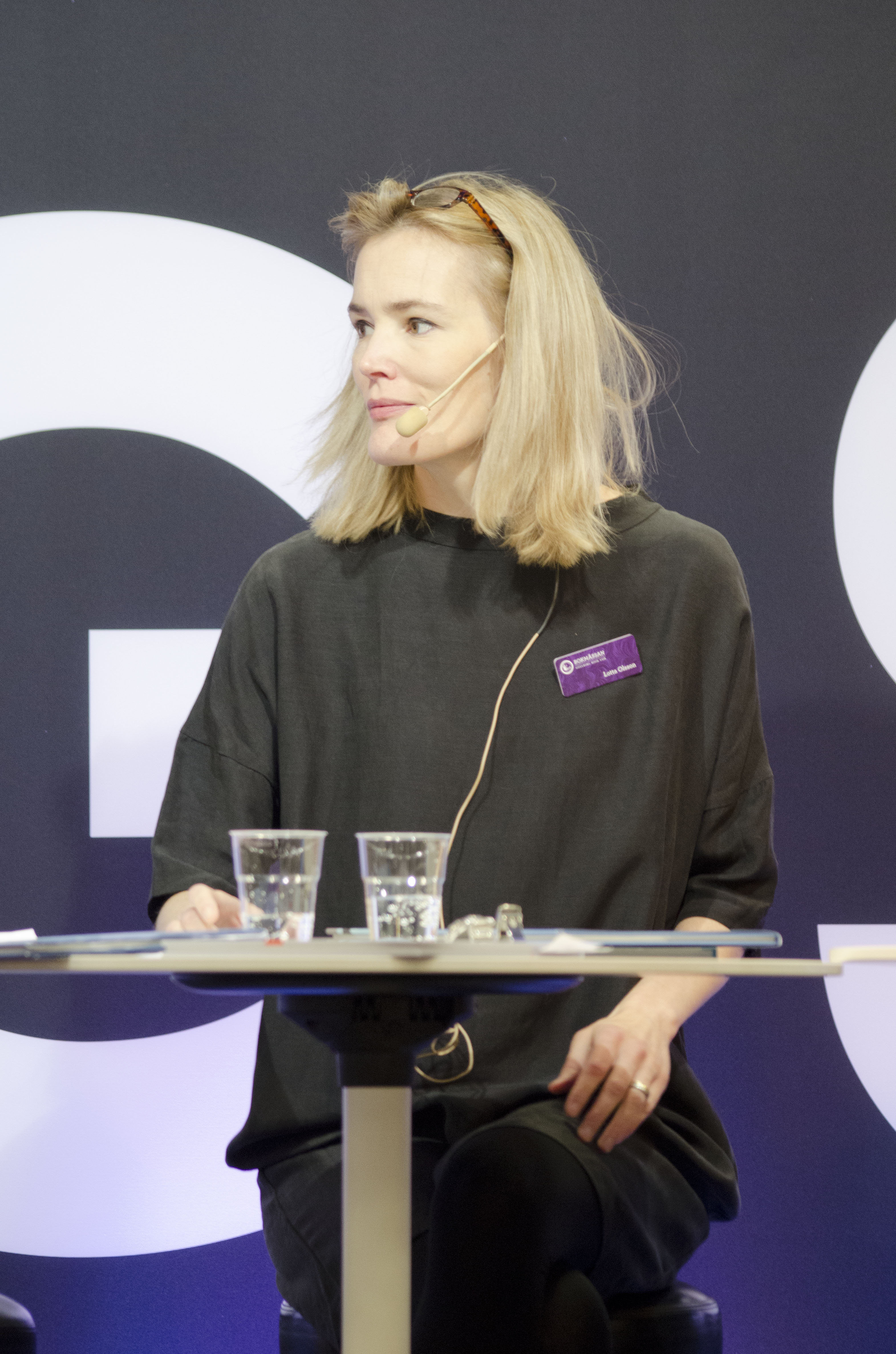 Lotta Olsson Göteborgs Bokmässa 2016.